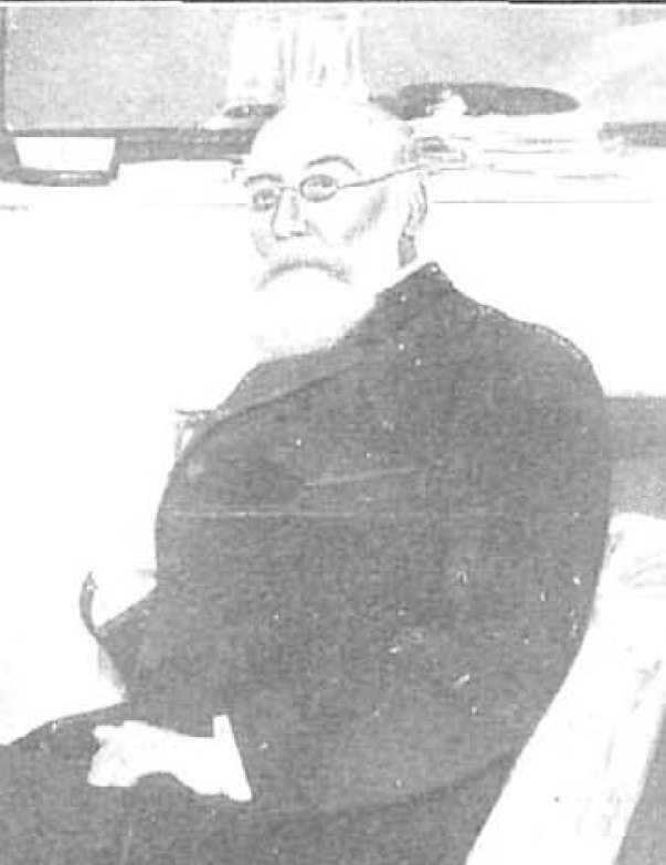 Juan Sol y Ortega.